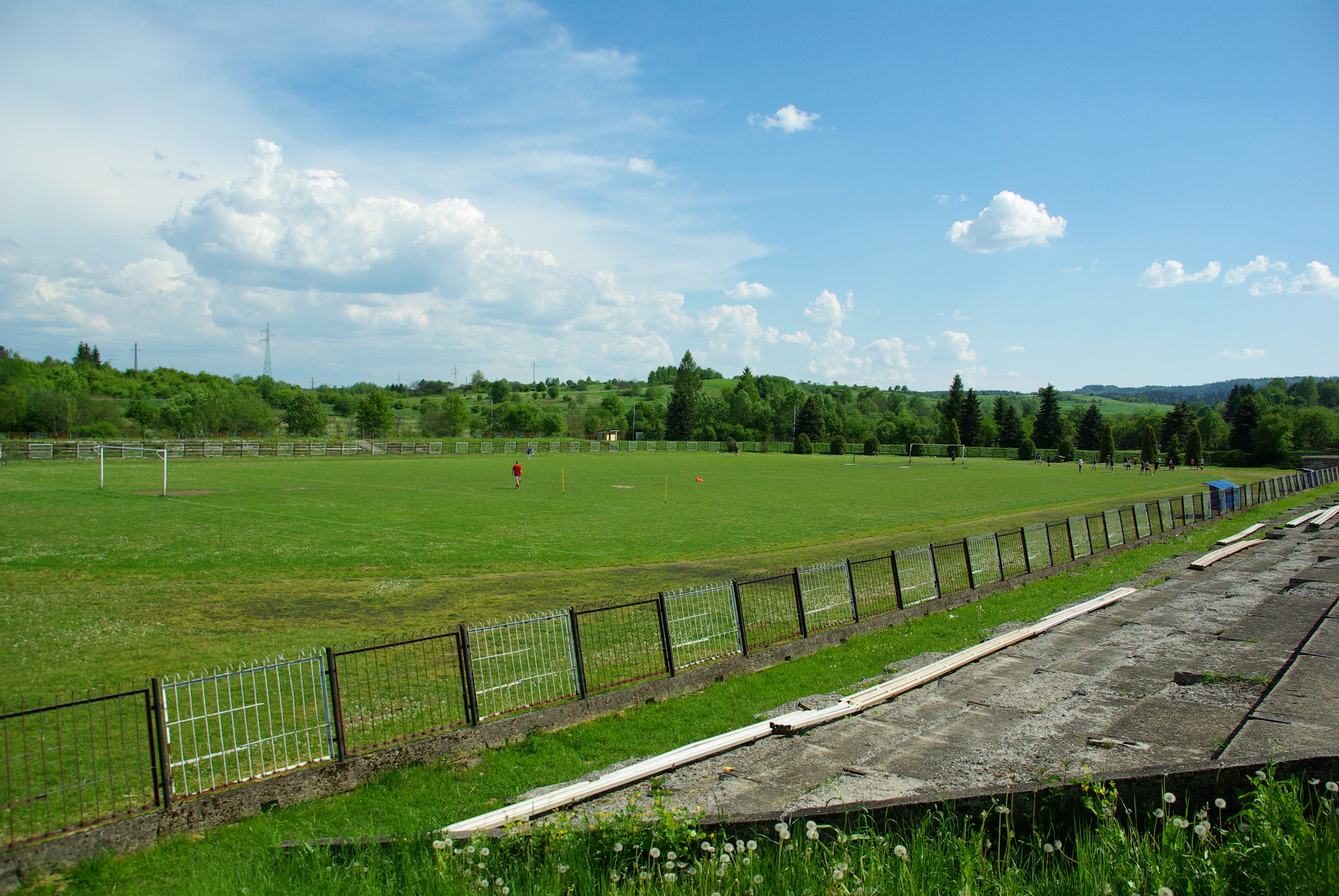 Stadium Stal Sanok Stróżowska